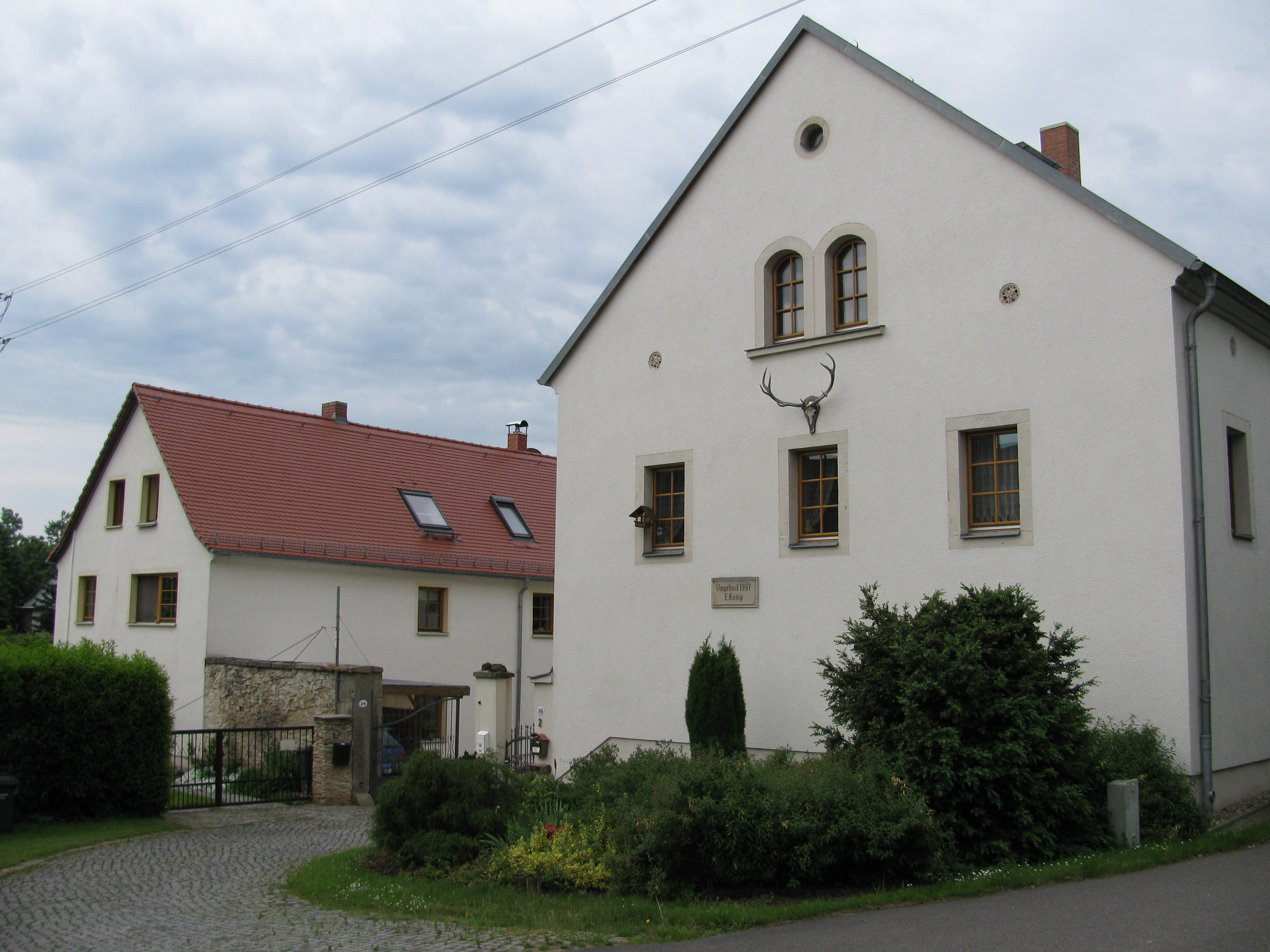 Gebäude im Dorfkern von Gompitz, Ortsteil von Dresden